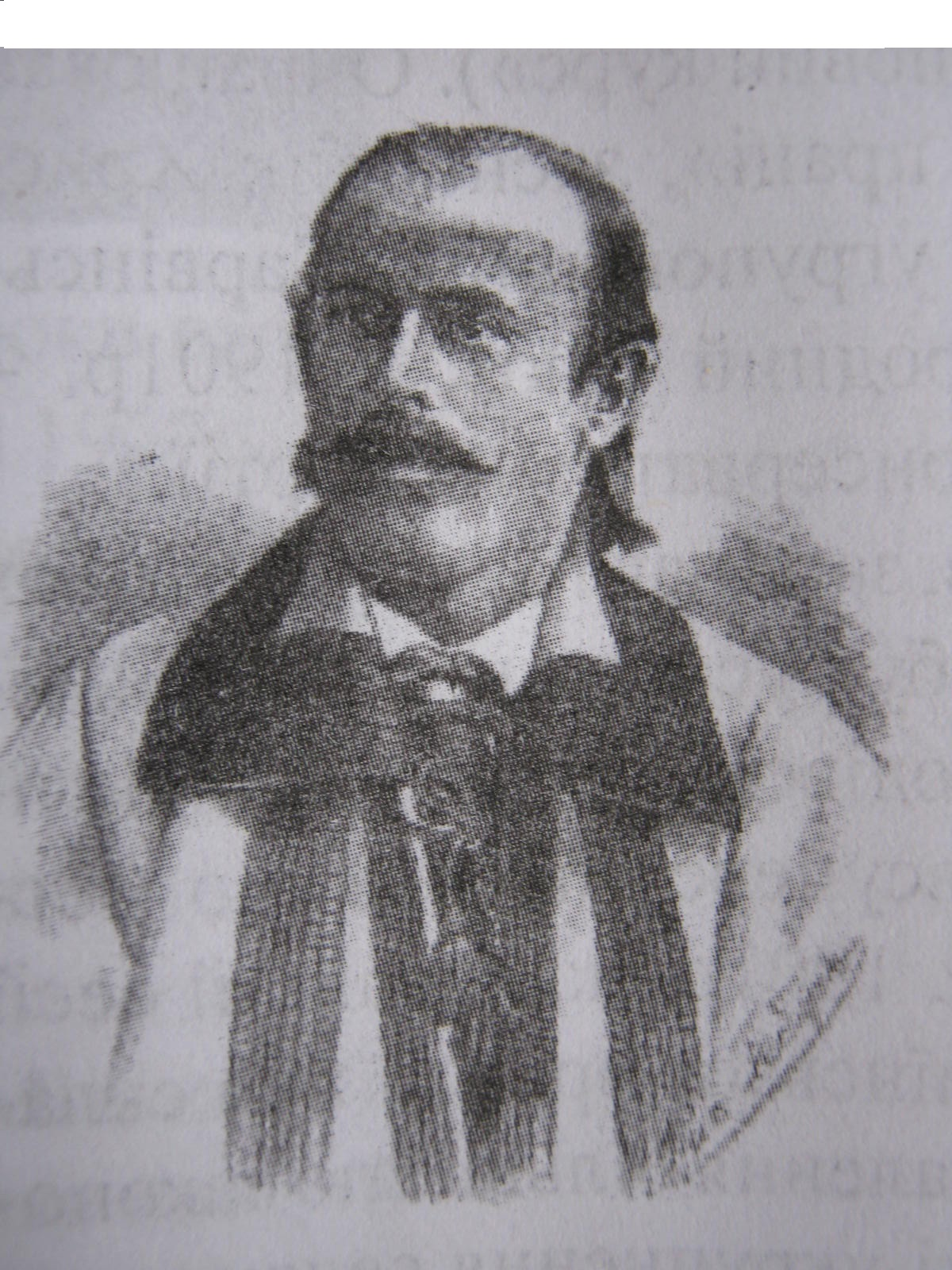 Олекса Барабаш